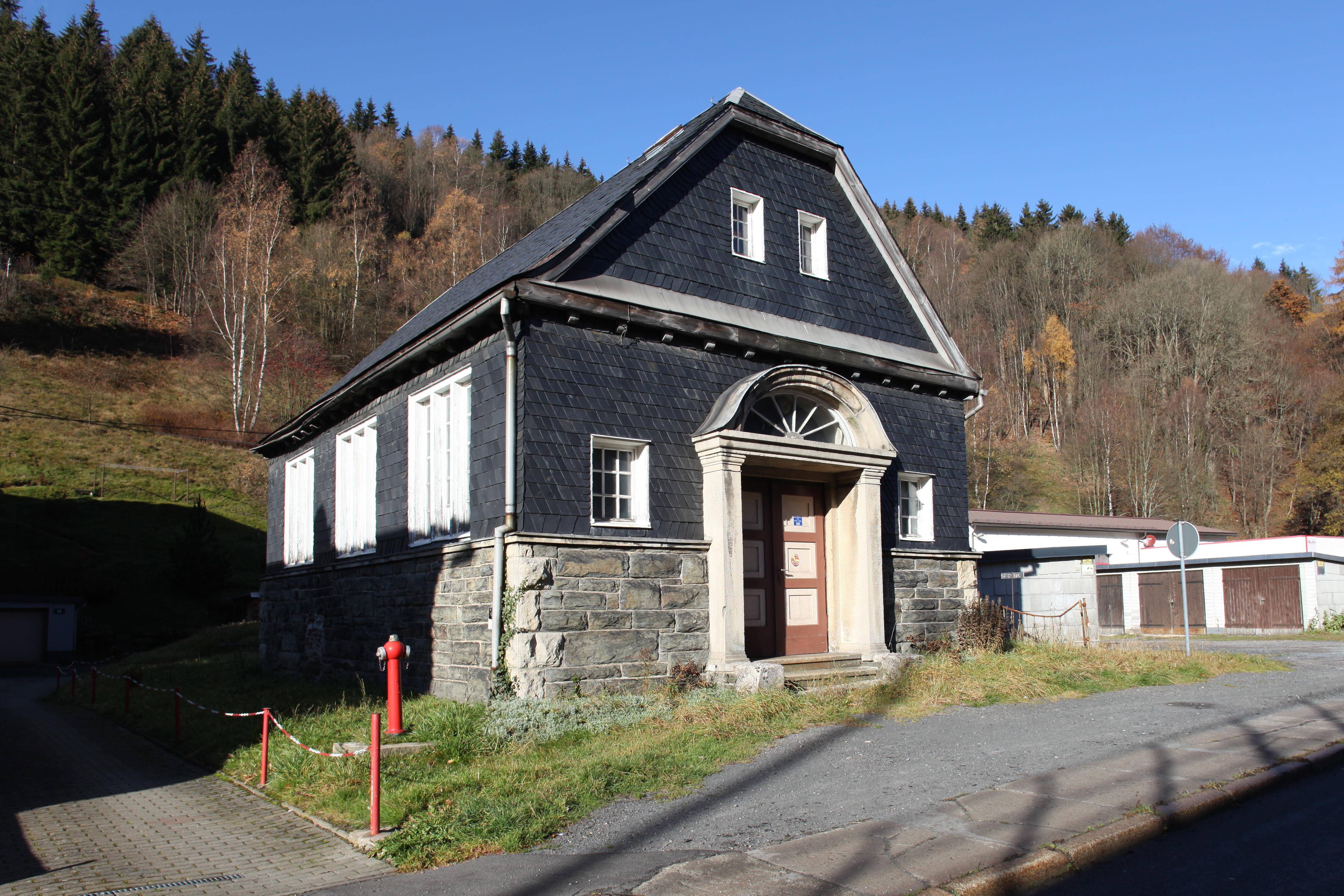 Hauptpumpwerk, 1910, Lauscha, Bahnhofstraße 62